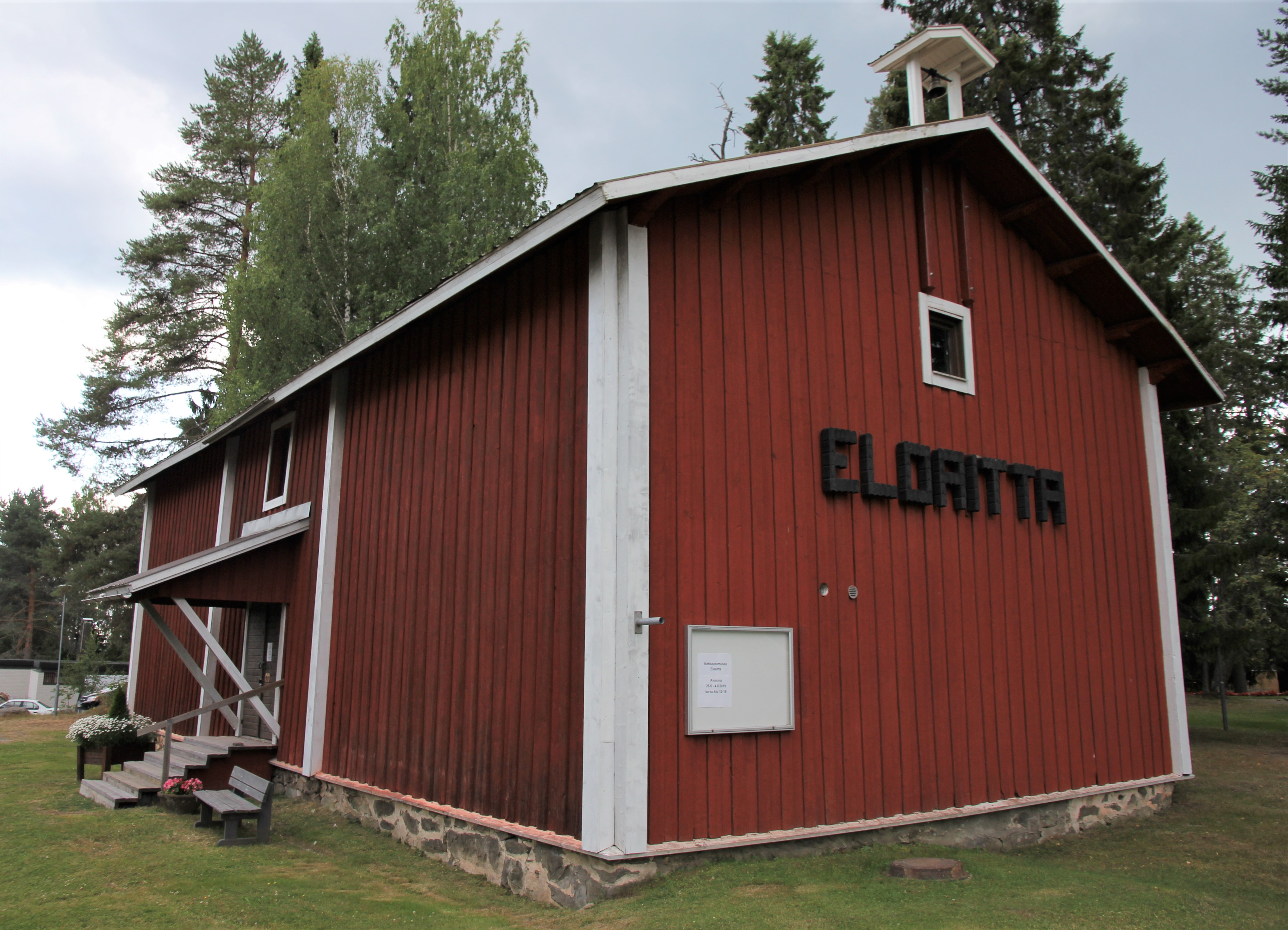 Kaavin kotiseutumuseo Eloaitta on Kaaviln kirkonkylässä toimiva kotiseutumuseo. Museon osoite on Kaavintie 7, Kaavi.